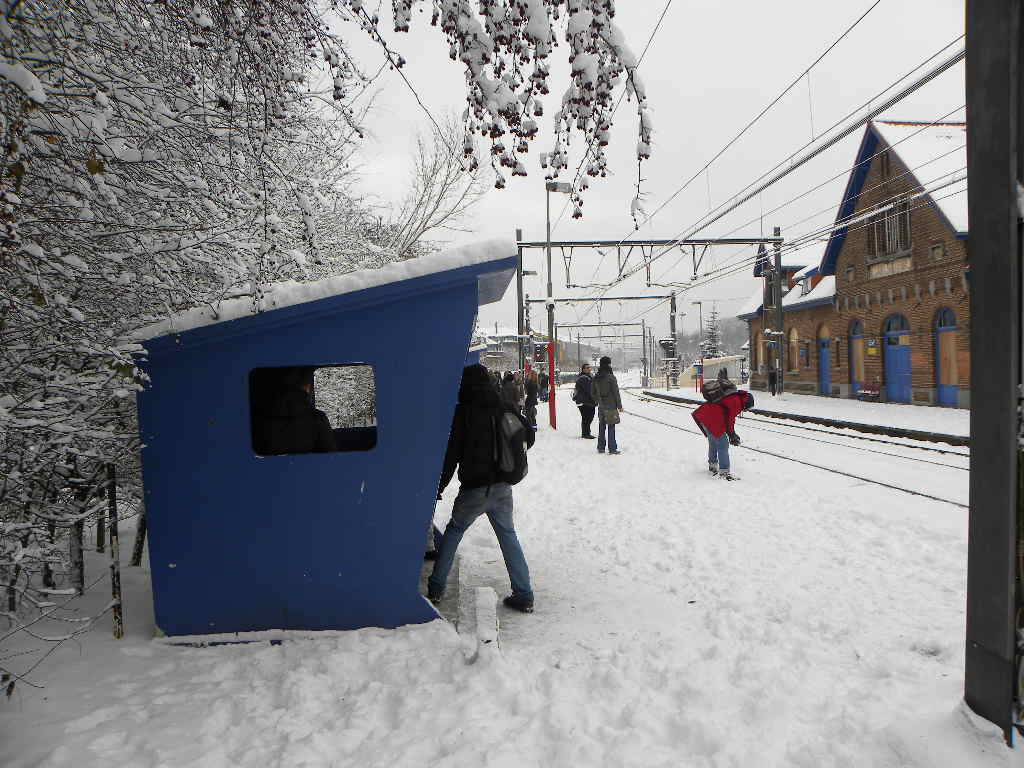 La gare de Court-Saint-Etienne sous la neige en décembre 2010. Vue du quai vers Ottignies.